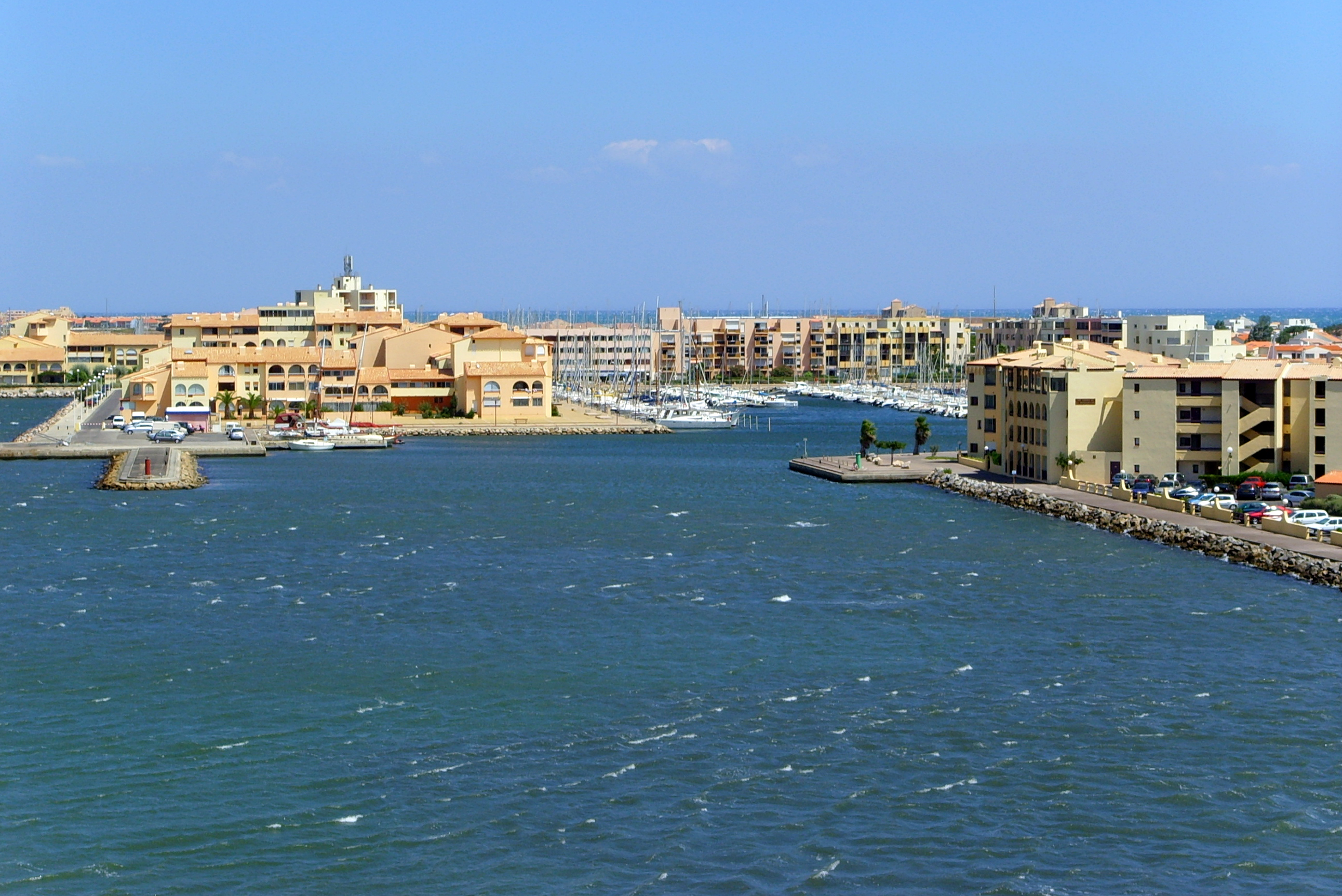 Leucate, Aude, France: Port Leucate photographer: Gerbil, summer 2006